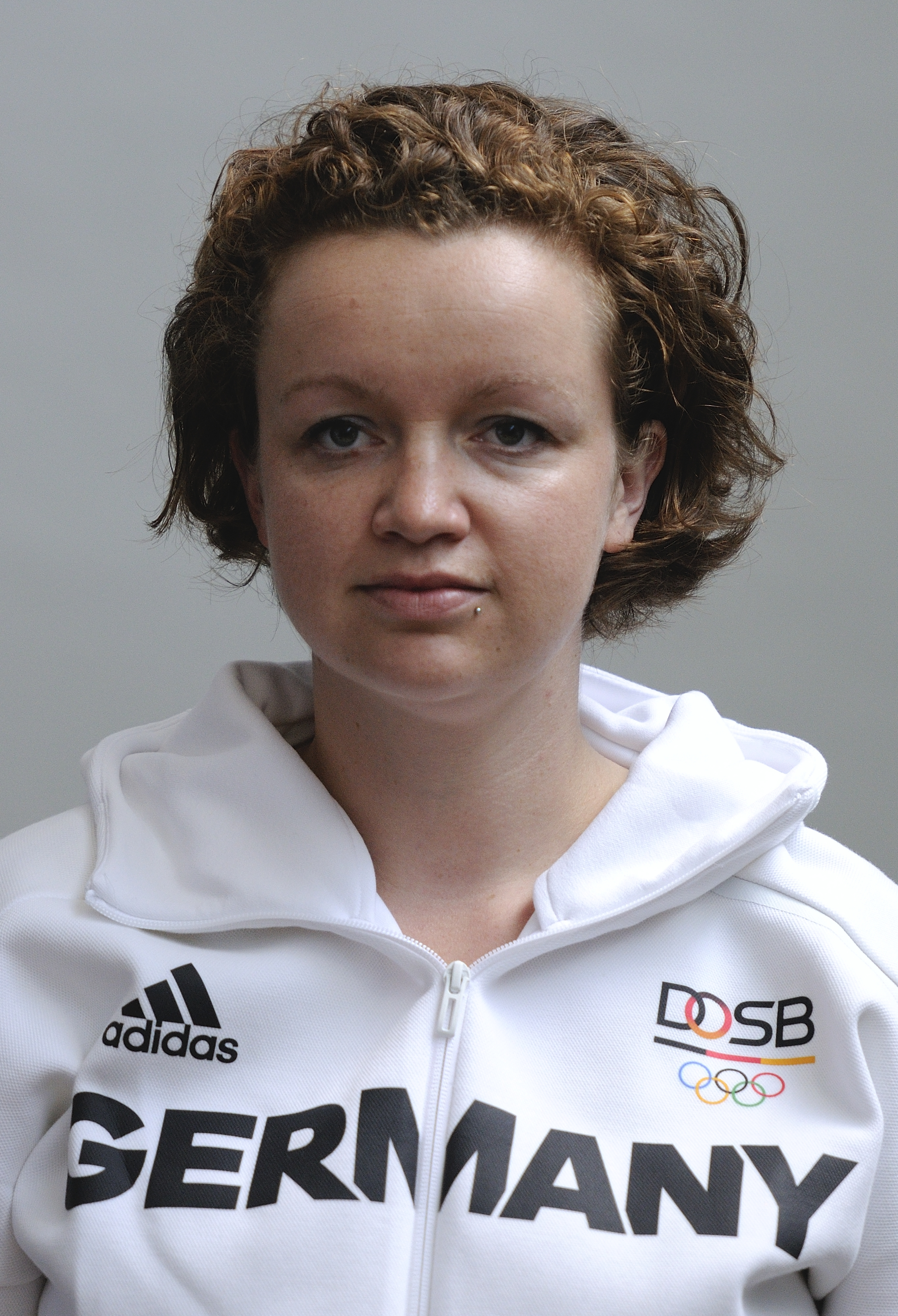 Bild aufgenommen in Hannover während der Einkleidung der deutschen Olympiamannschaft 2016. Eva Rösken.